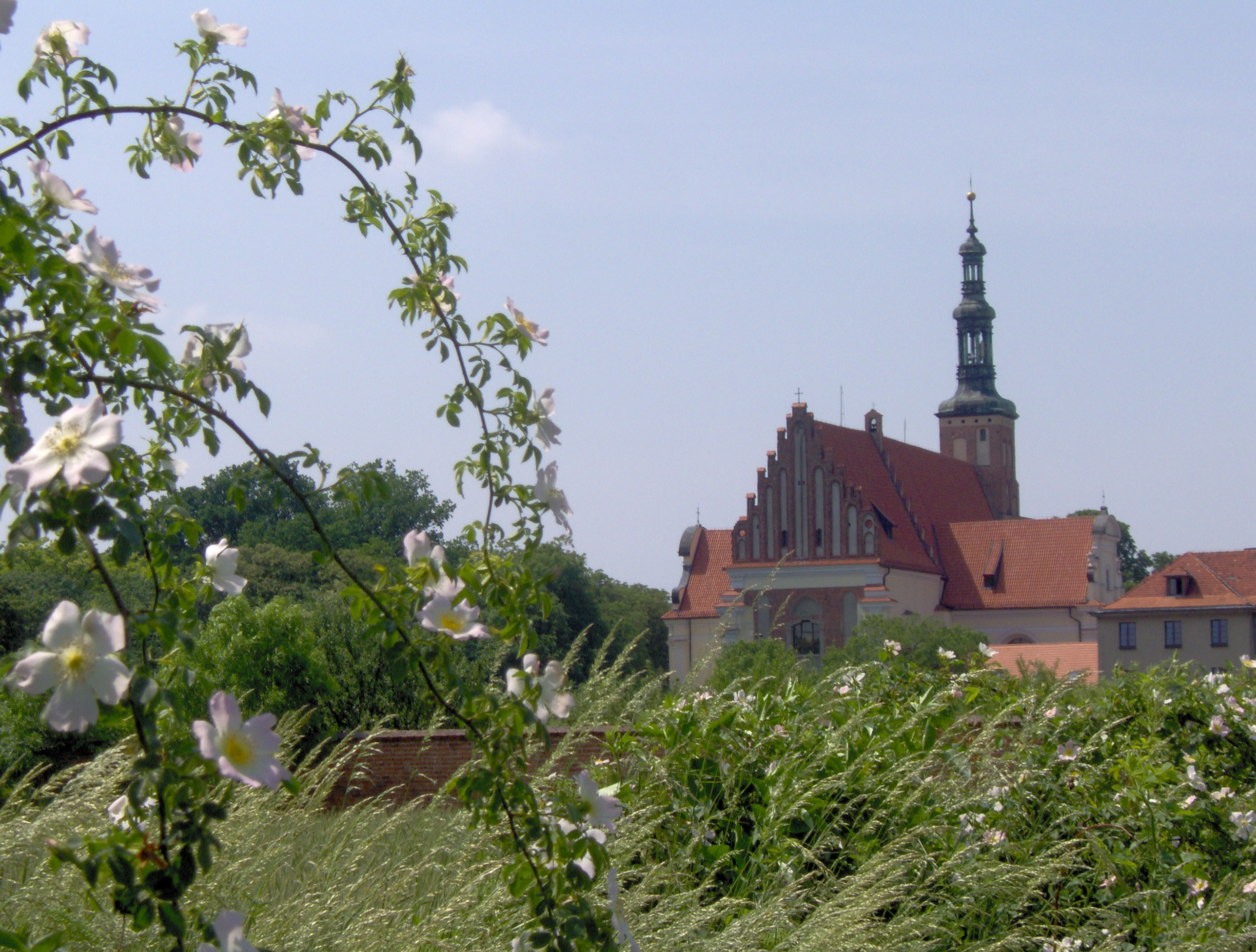 Lubiń - zespół opactwa benedyktynów z XII-XX w. (zabytek nr 202/Wlkp/A)